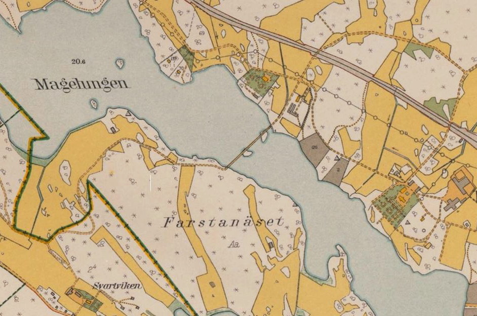 Detaljerad karta över Stockholm med omnejd. Upprättad mellan 1917 och 1934. Del av sjön Magelungen.